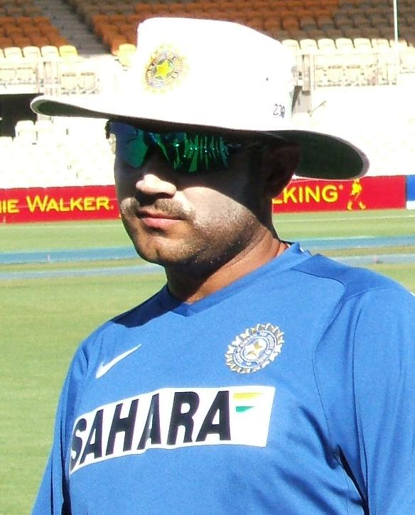 Virender Sehwag at Adelaide Oval